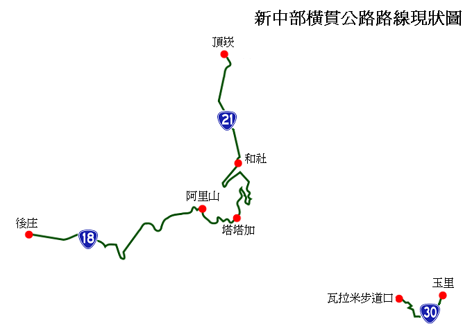 新中部橫貫公路路線現狀圖。